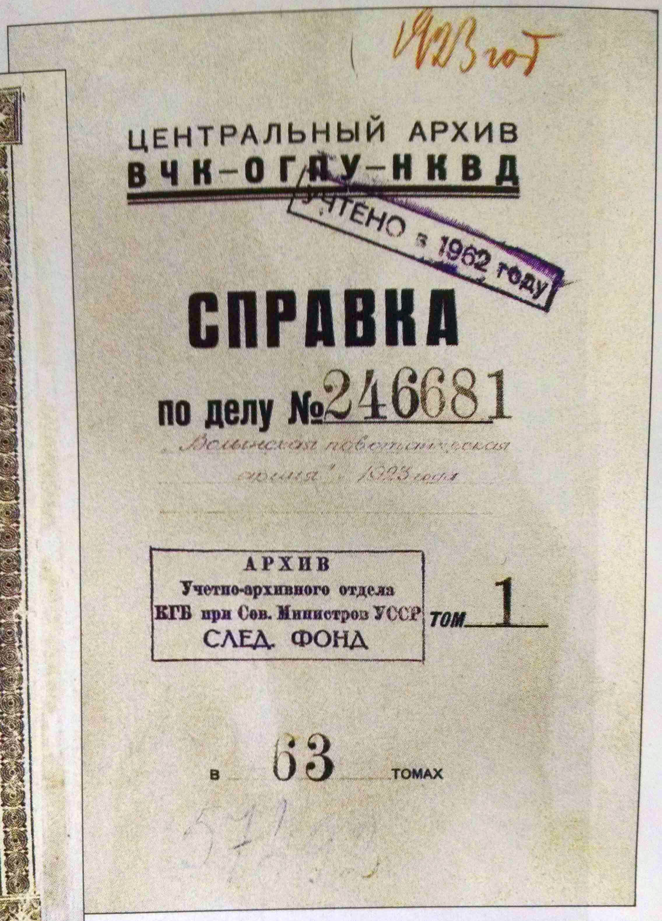 Довідка ВЧК по справі Волинської повстанської армії (з архівів ГДА СБУ)